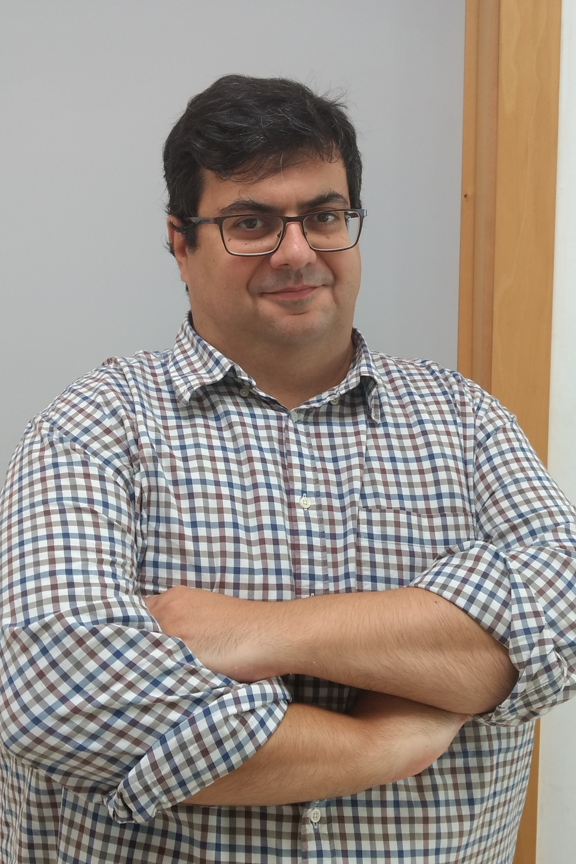 Álvaro Pons als estudis de Ràdio Godella.